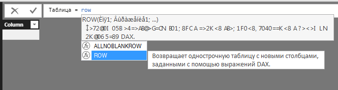 Проблемы локализации офф-лайн справки в Microsoft Power BI Desktop. Пример интерфейса